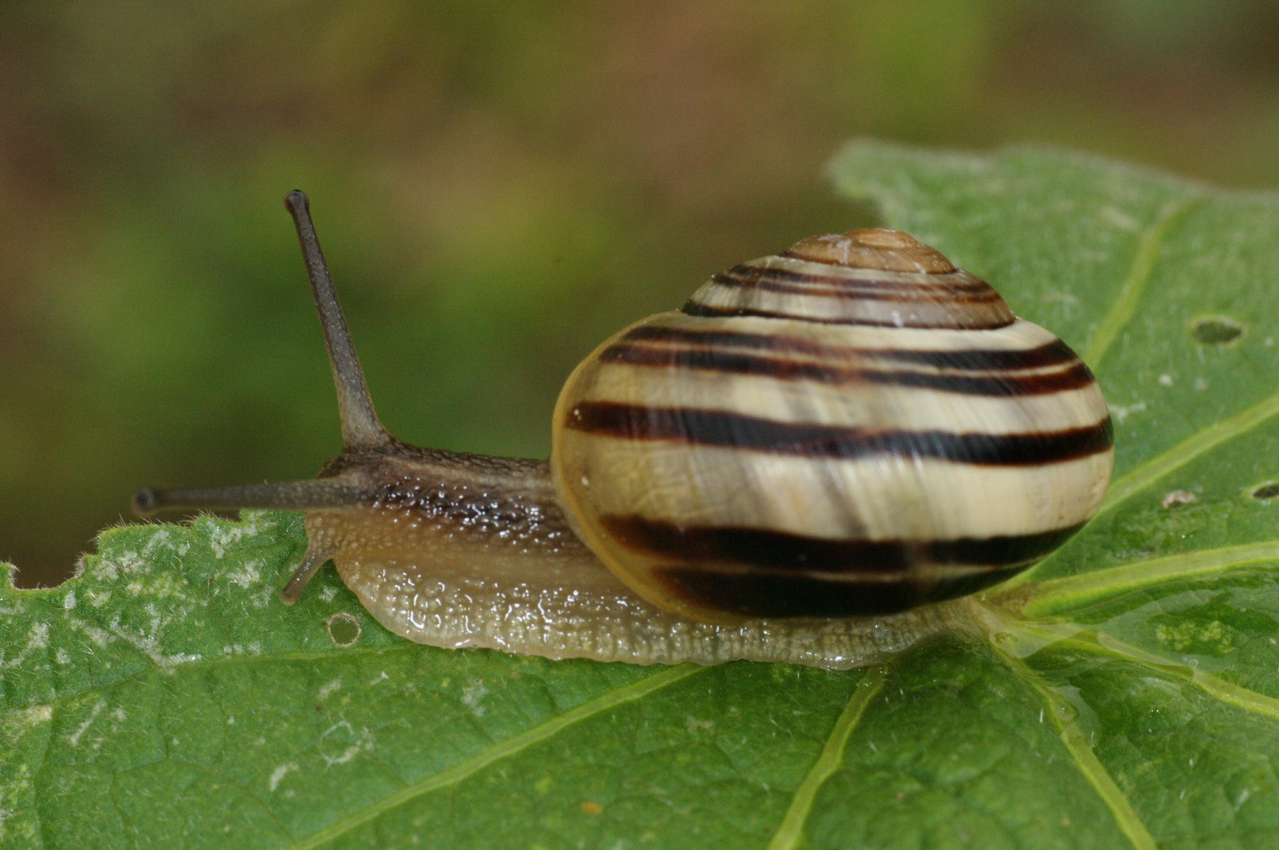 Garten-Bänderschnecke auf einem Rhabarberblatt Object location53° 12′ 10.58″ N, 13° 18′ 59.47″ E